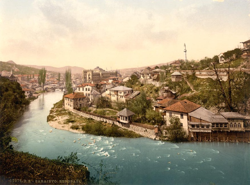 Sarajcvo (i.e. Sarajevo) Bendbasi Bosnia Austro-Hungary